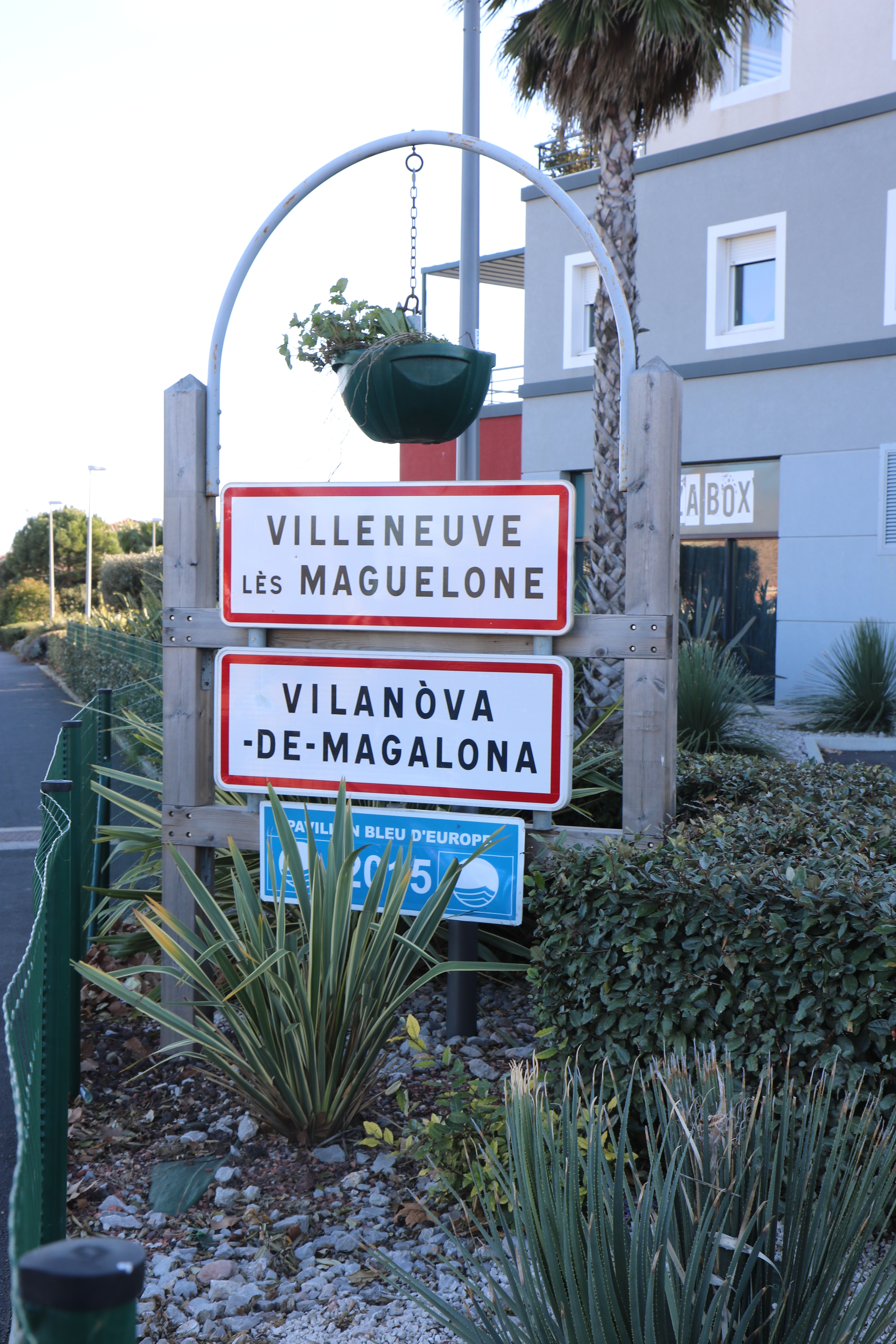 Villeneuve-lès-Maguelone (Hérault) - panneau d'entrée bilingue (français/occitan) : Villeneuve-lès-Maguelone/Vilanòva-de-Magalona.